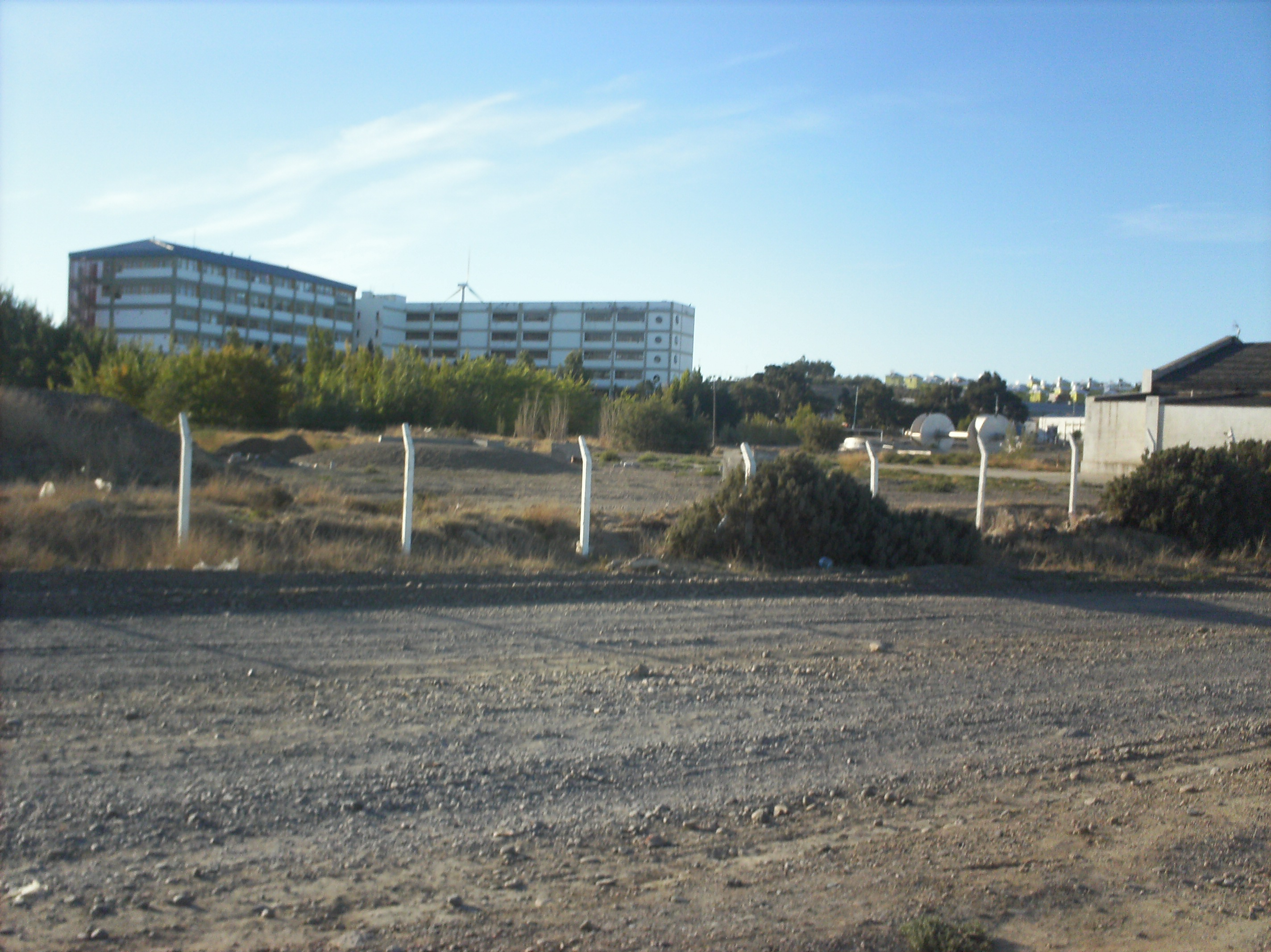 universidad y elbarrio km4juntos